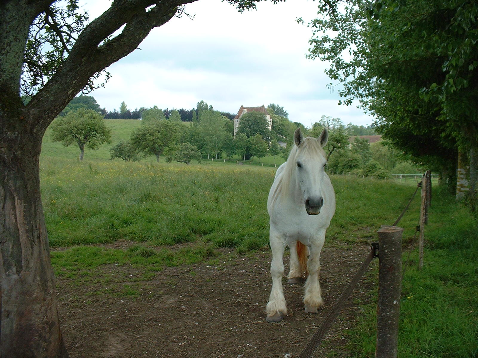 Vue du domaine et du manoir de Courboyer